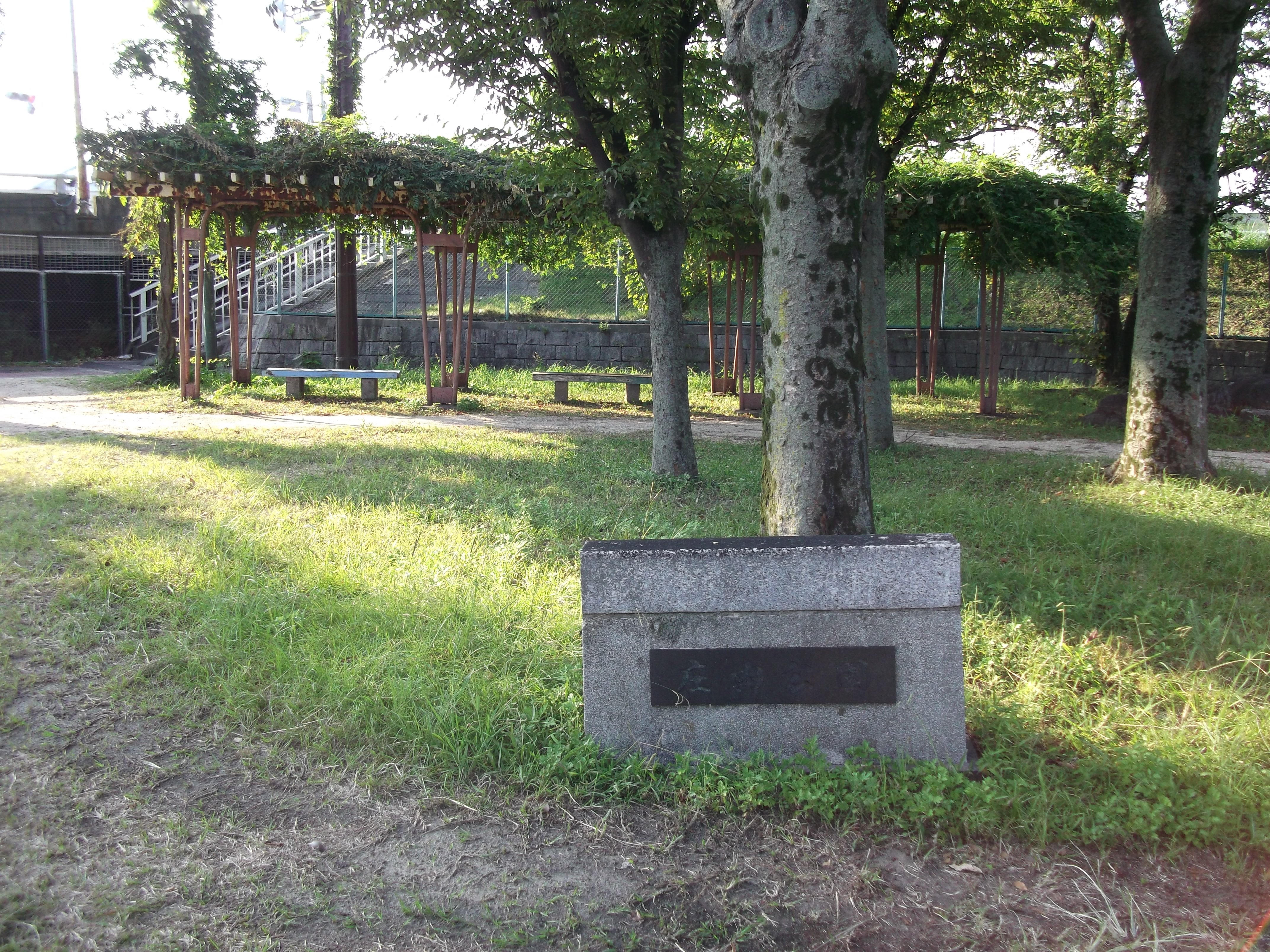 名古屋市西区の庄内公園内を撮影